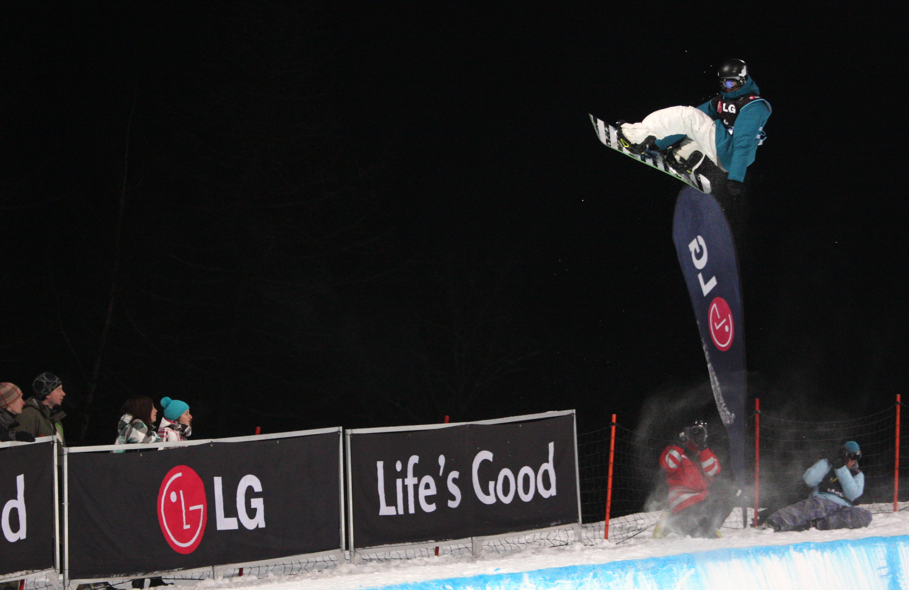 Kreischberg_HP_Gary_Zebrowski_FRA